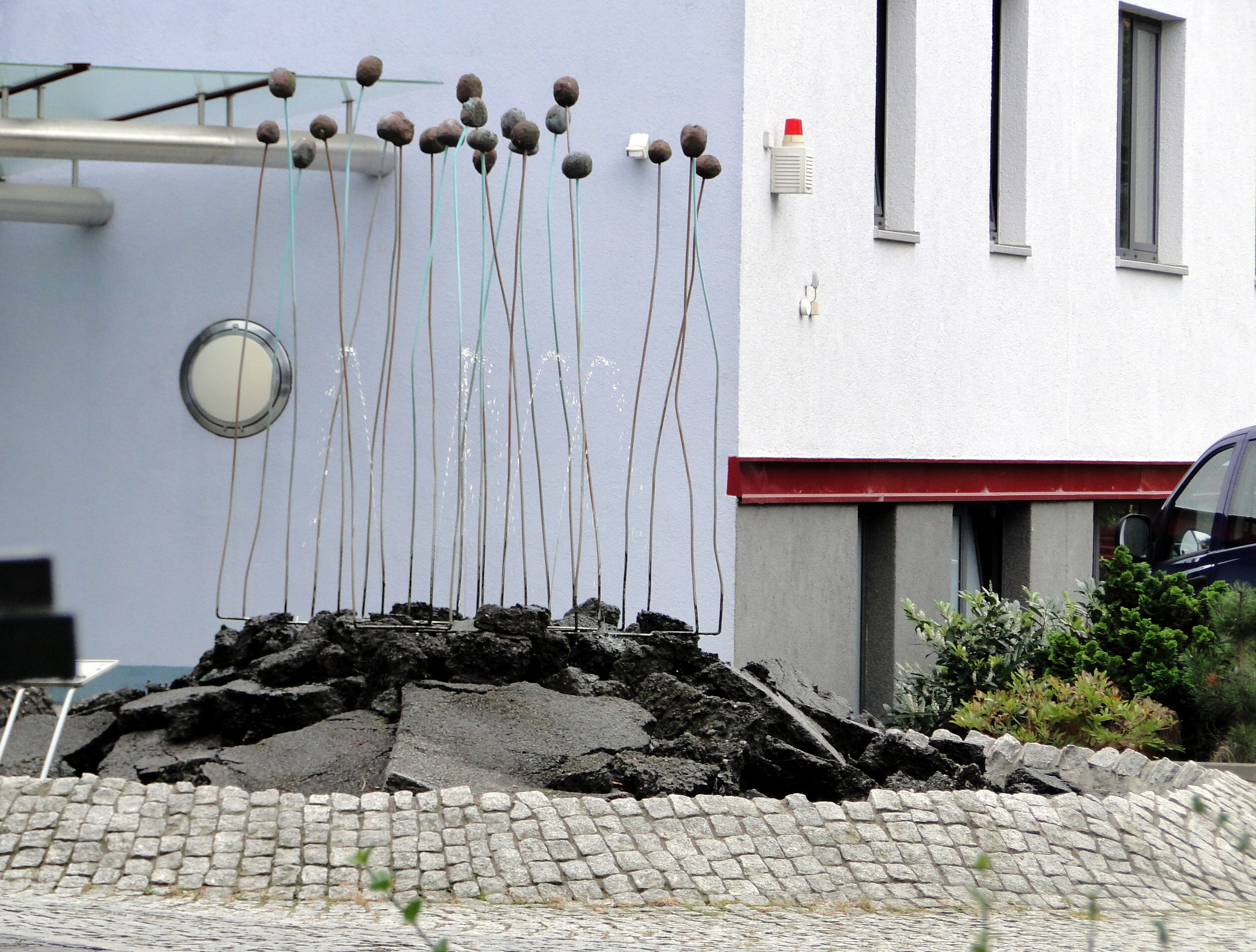 Schönwetterbrunnen in Dresden-Plauen